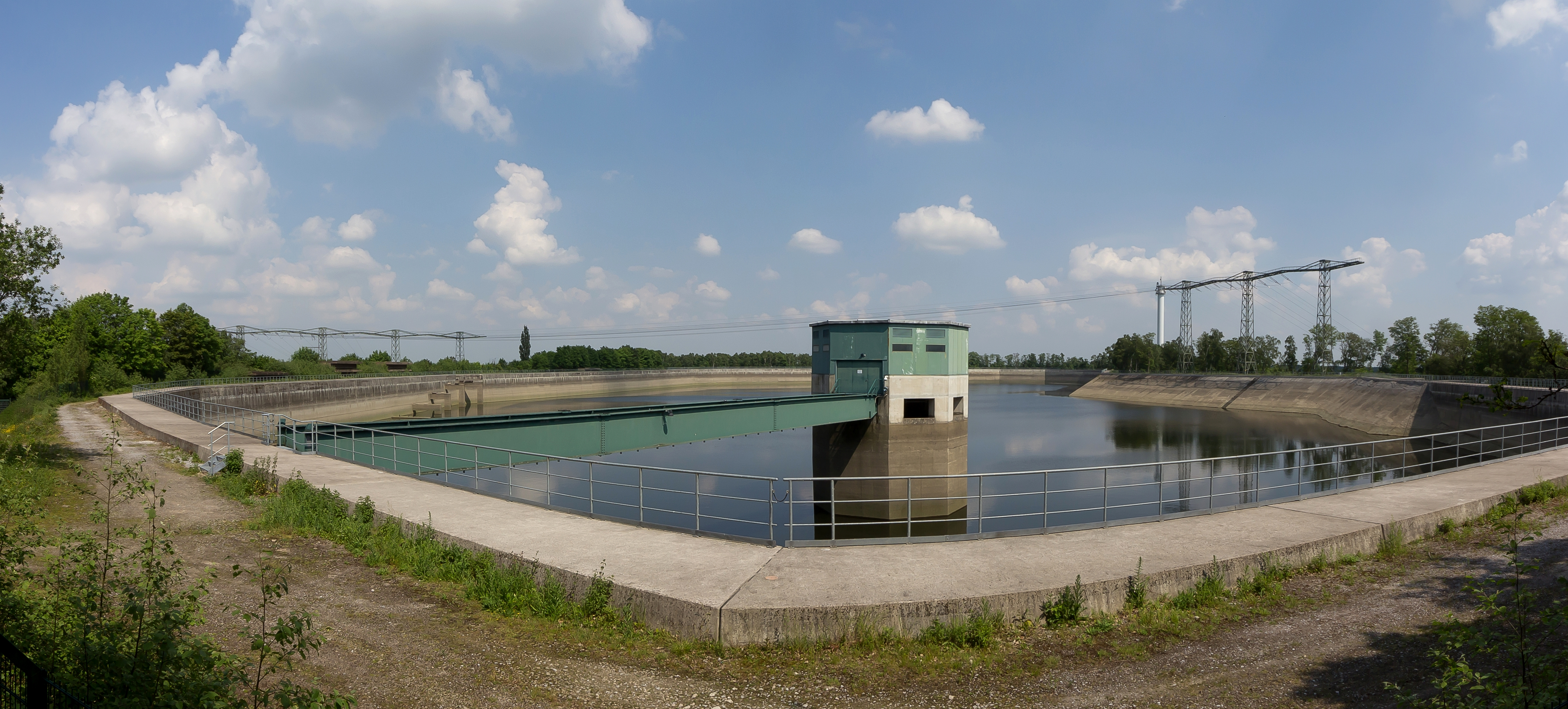 Koepchenwerk: Pumpspeicherbecken mit Entnahmebauwerk (vorne)